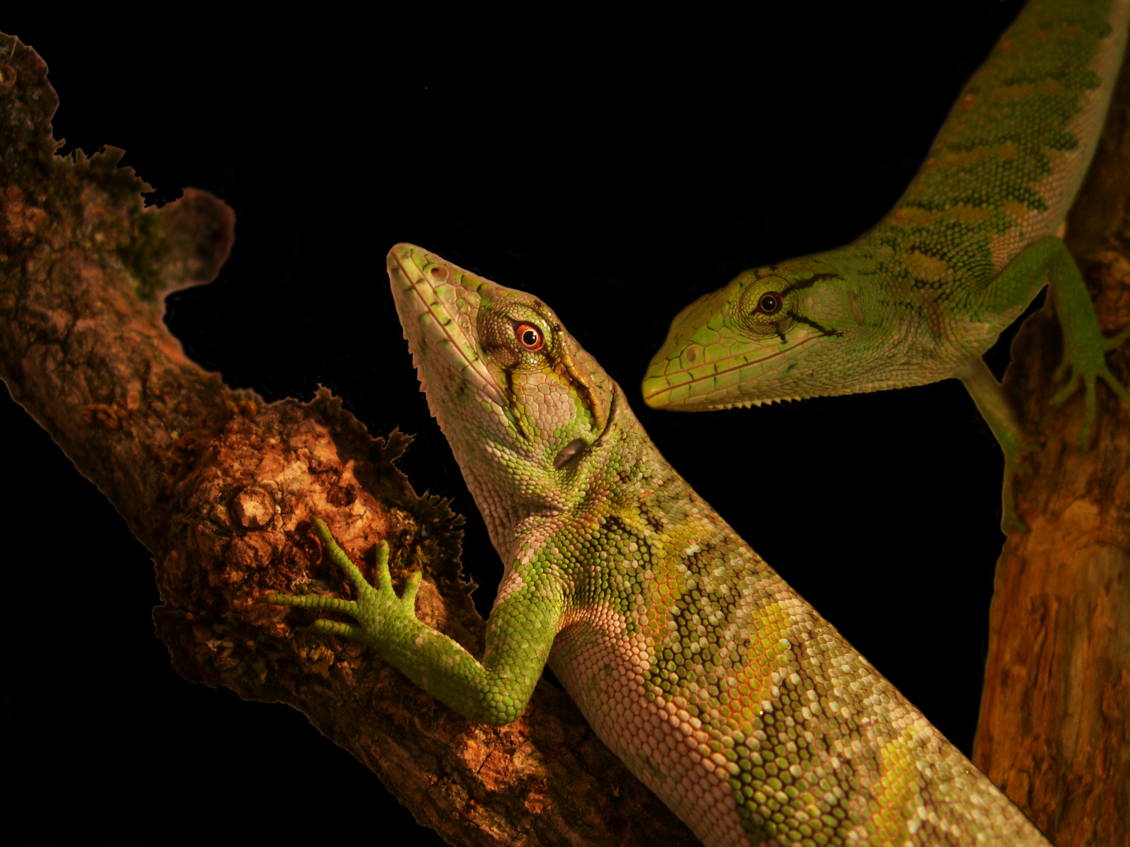 Pärchen polychrus marmoratus